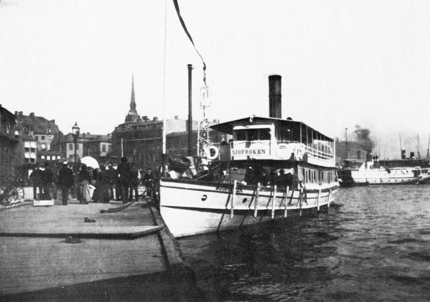 S/S Sjöfröken vid Riddarholmskajen, 1890-tal